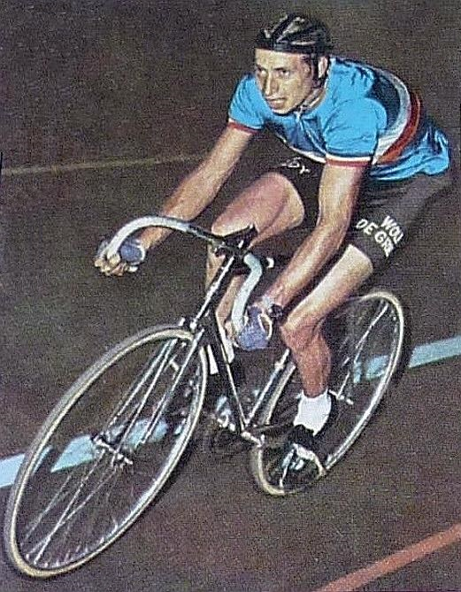 Jean Jourden (1971 - amateurs world champion 1961), 'Sprint 71', Panini figurina n°85.